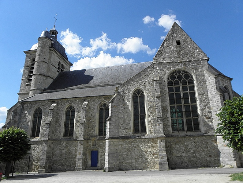 Église Saint-Martin de Troissy (51).